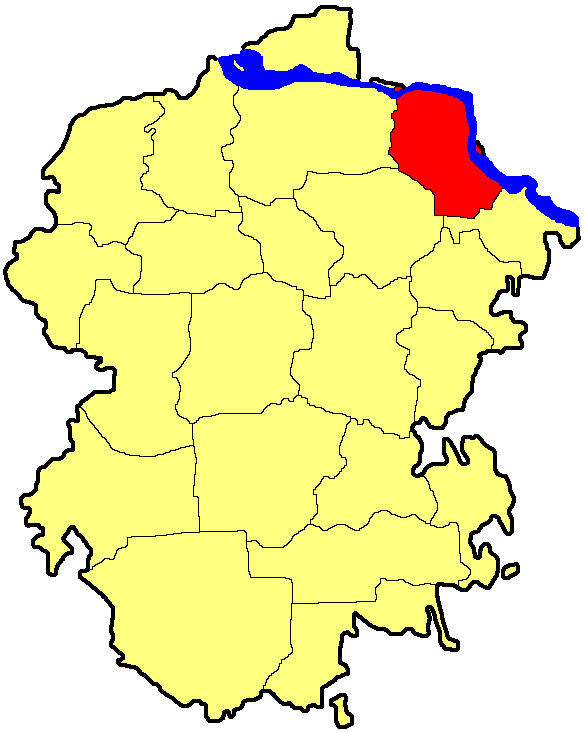 Маріїнсько-Посадський район Чувашії